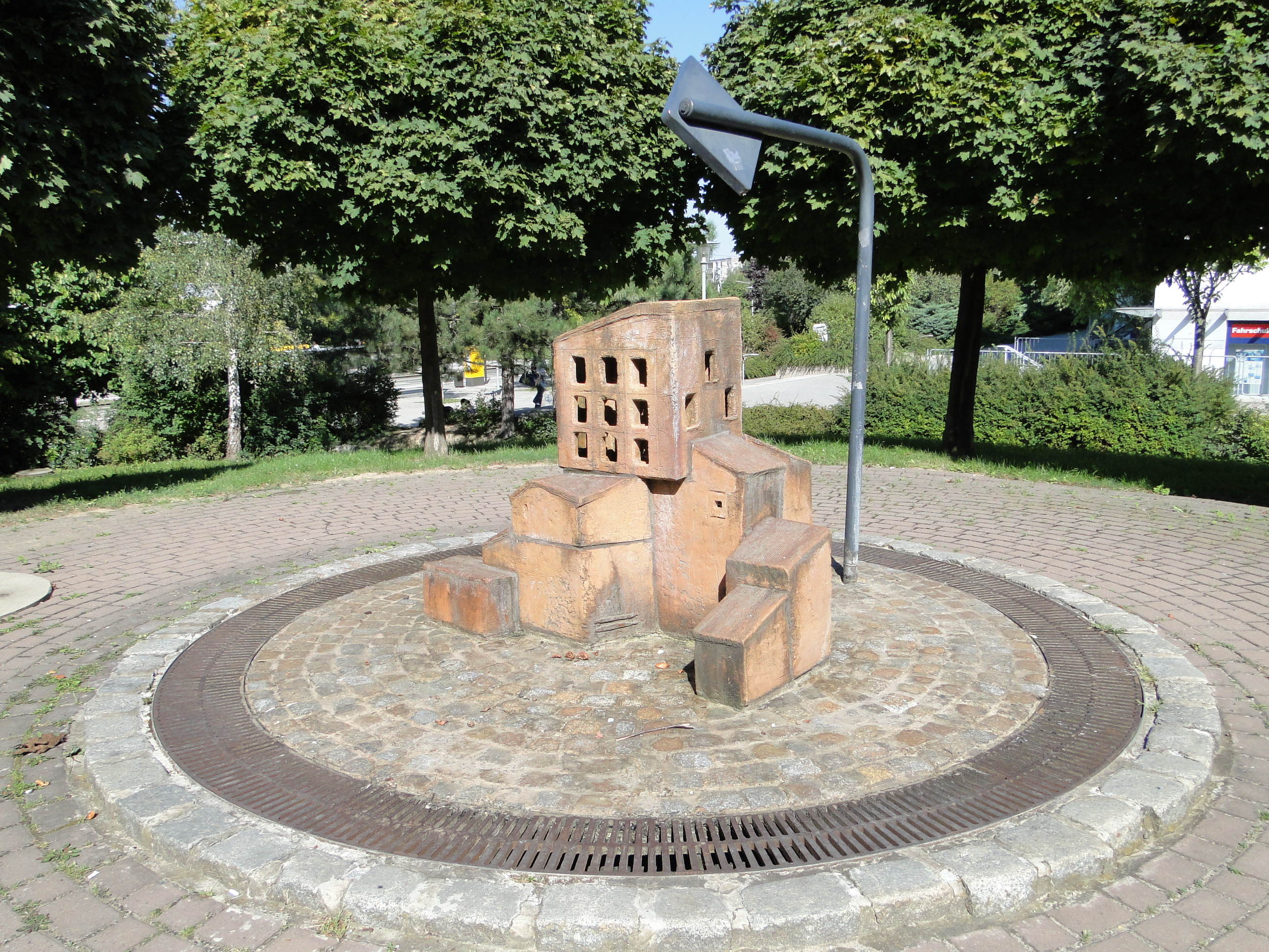 Brunnen „Nasses Haus“ auf dem Amalie-Dietrich-Platz in Gorbitz, Dresden